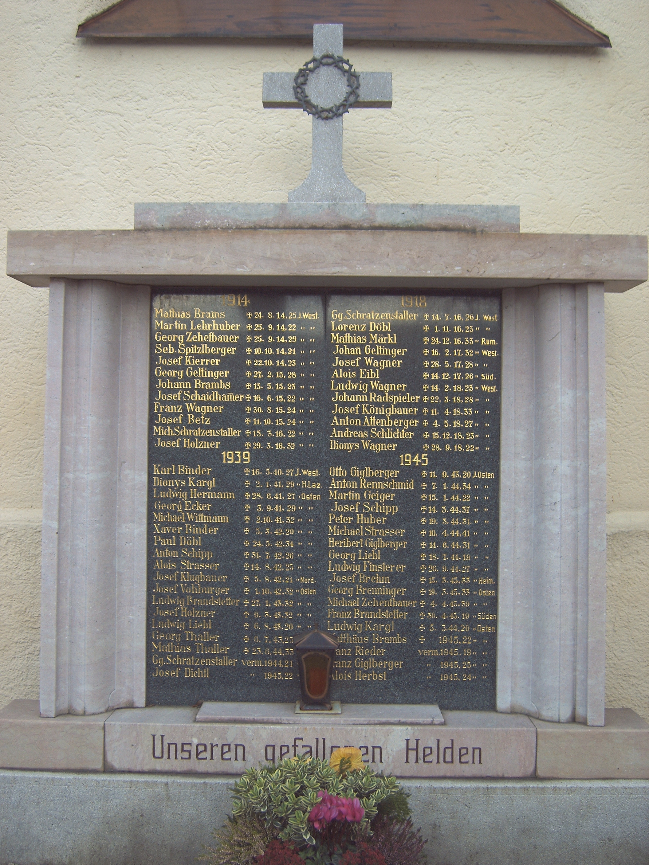 Kriegerdenkmal vor der Jugendstilkirche Maria Immaculata in Dietelskirchen in Bayern, Deutschland.